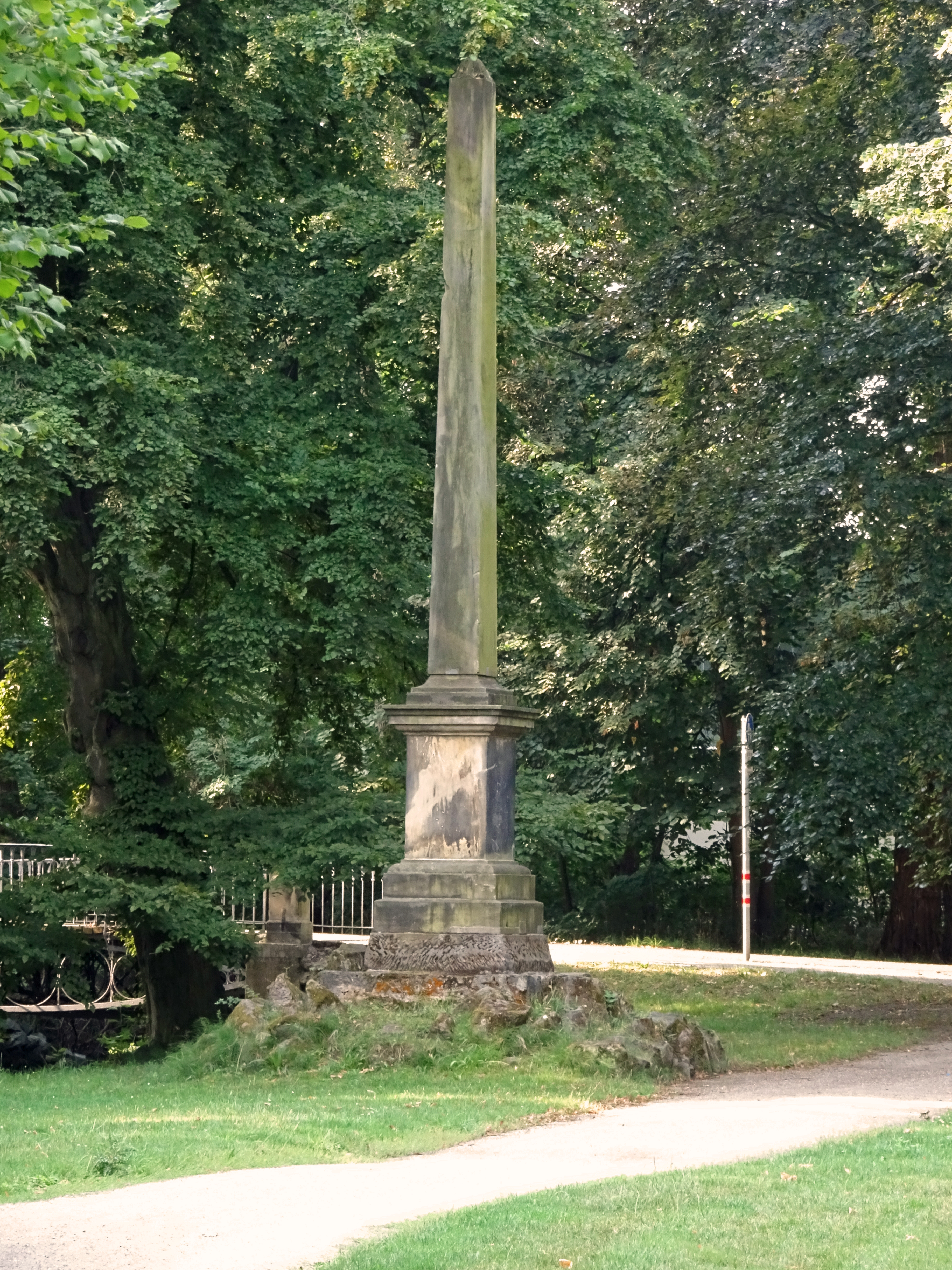 Der Hundestein in Hannover, auch „Hundedenkmal“, ist ein ca. 12 Meter hoher Obelisk im Georgengarten. Die Aufnahme ist korrekt, der Obelisk steht leicht schräg.